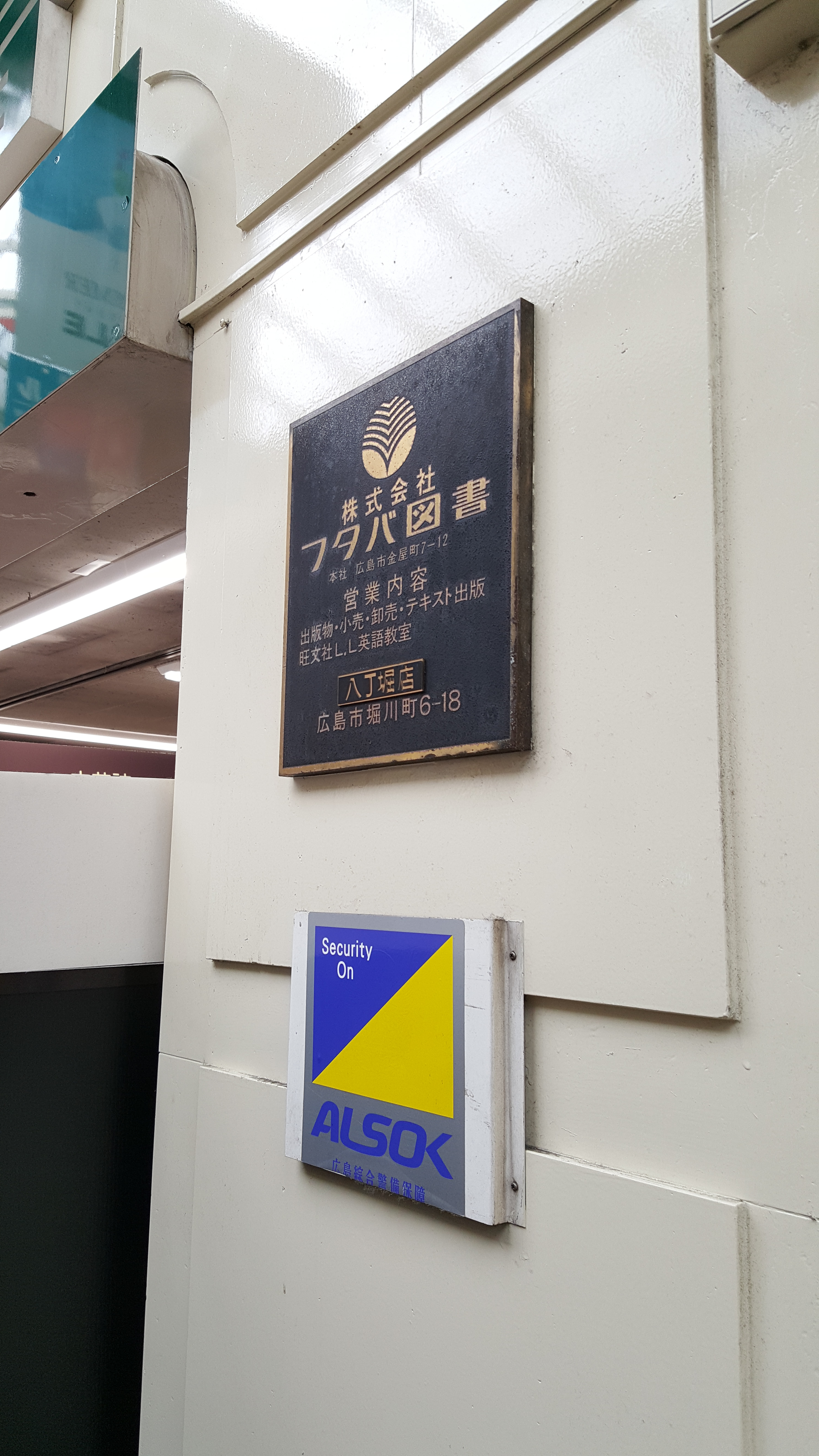 フタバ図書八丁堀店外壁のプレート。観音移転前の本社所在地が示されている